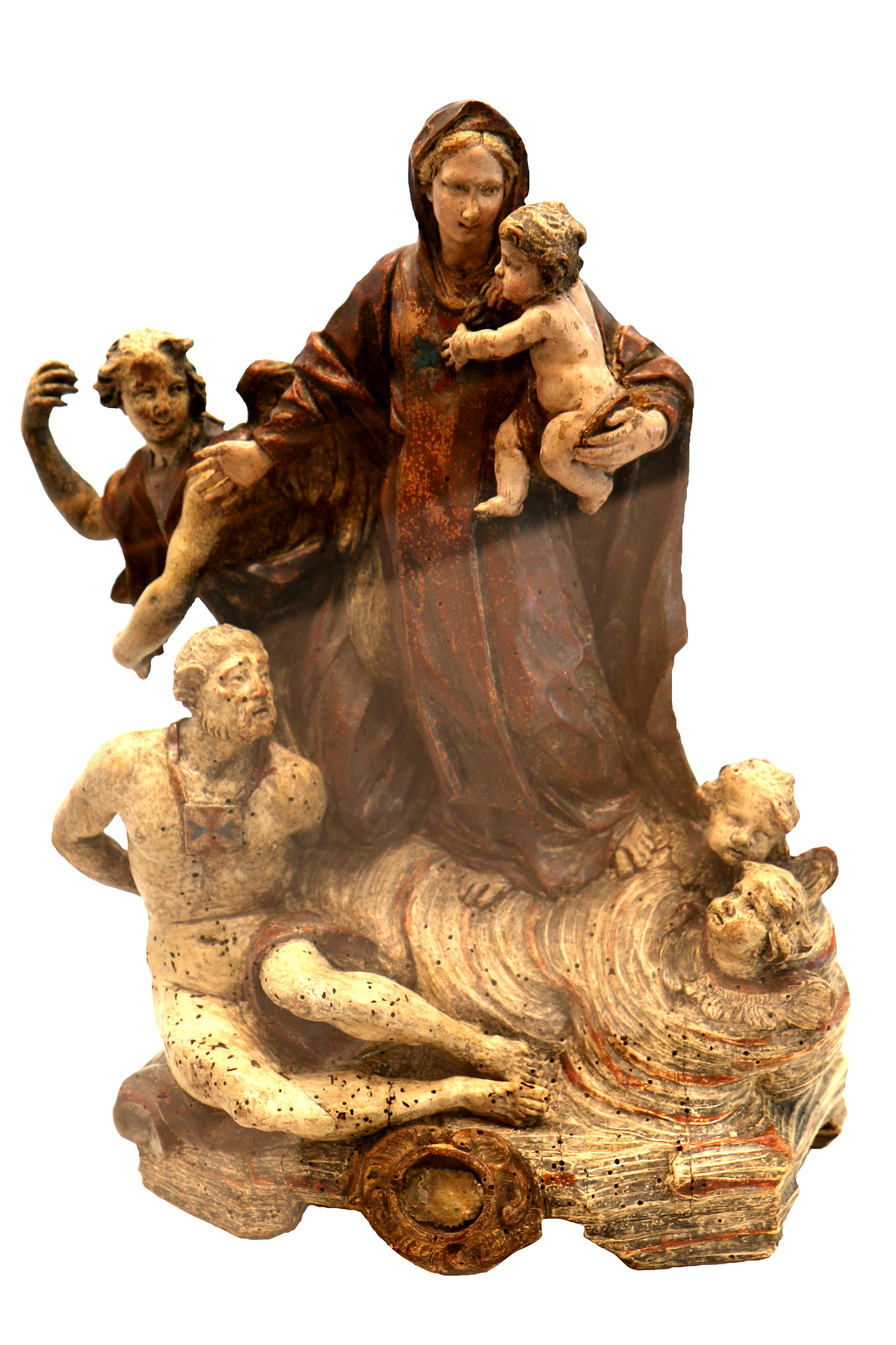 Reliquaire du XVII° siècle en bois polychrome de l'ordre des Trinitaires au musée d'histoire de Marseille.